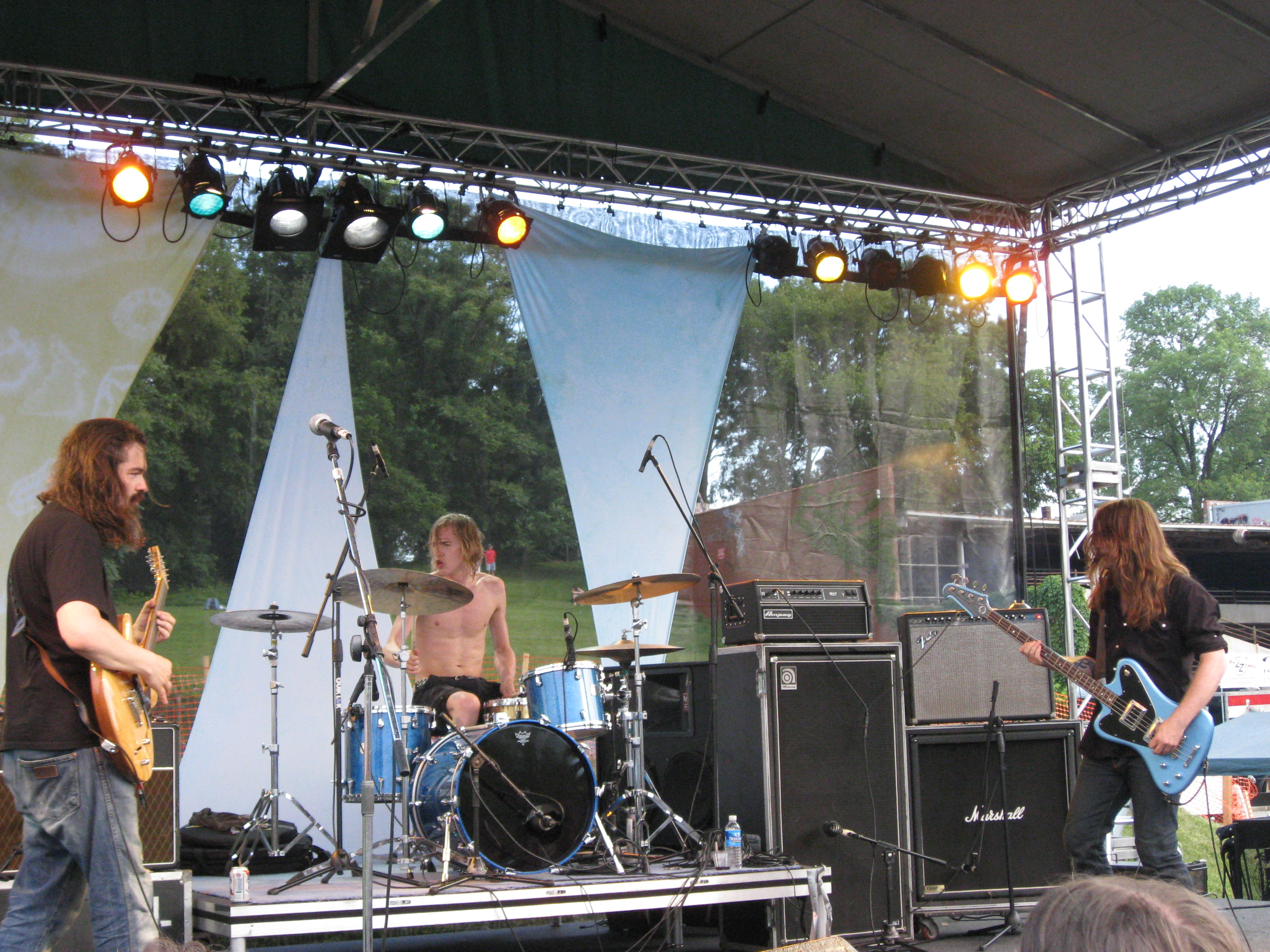 Motorpsycho, Terrastock